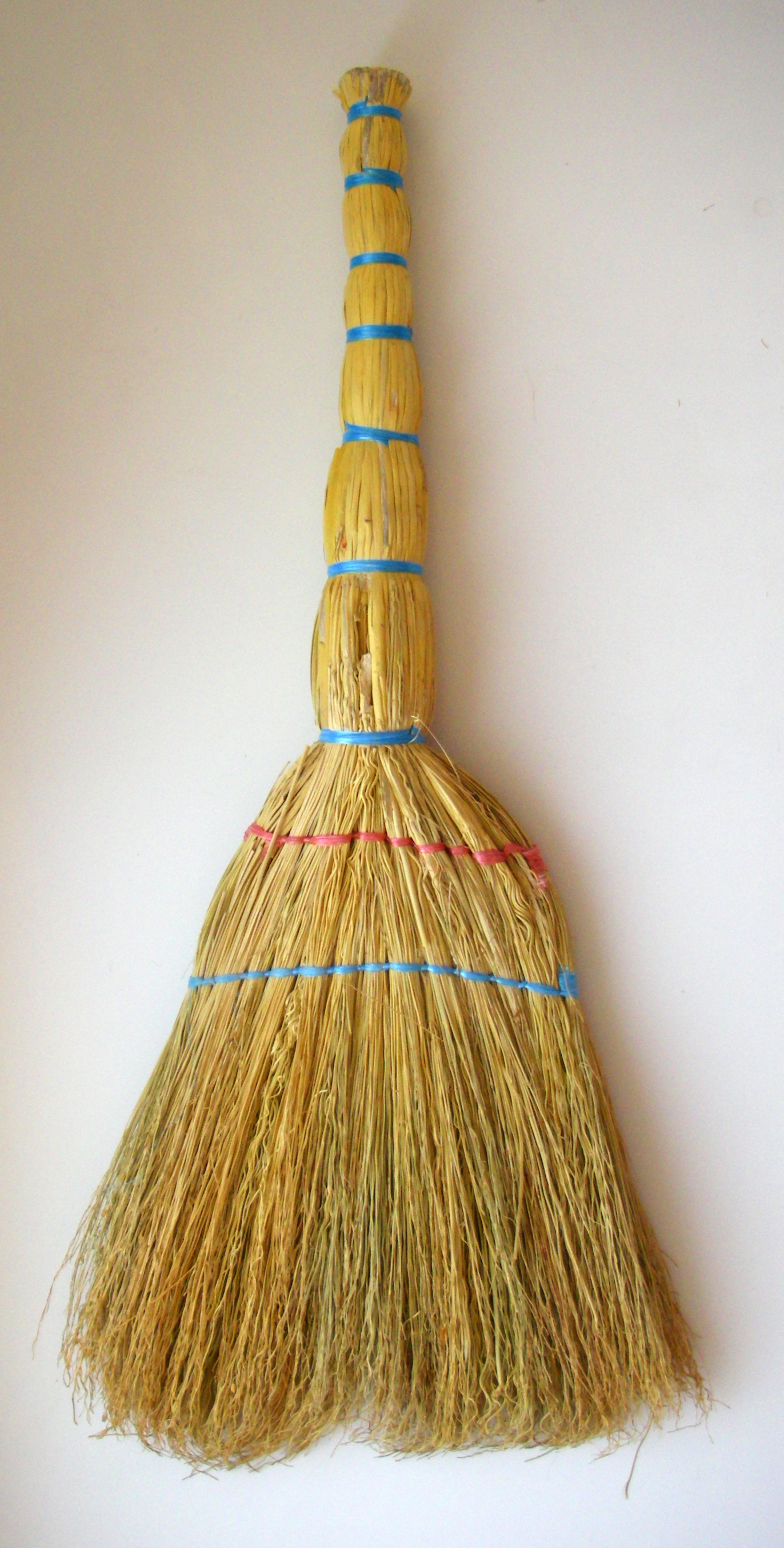 Русский веник